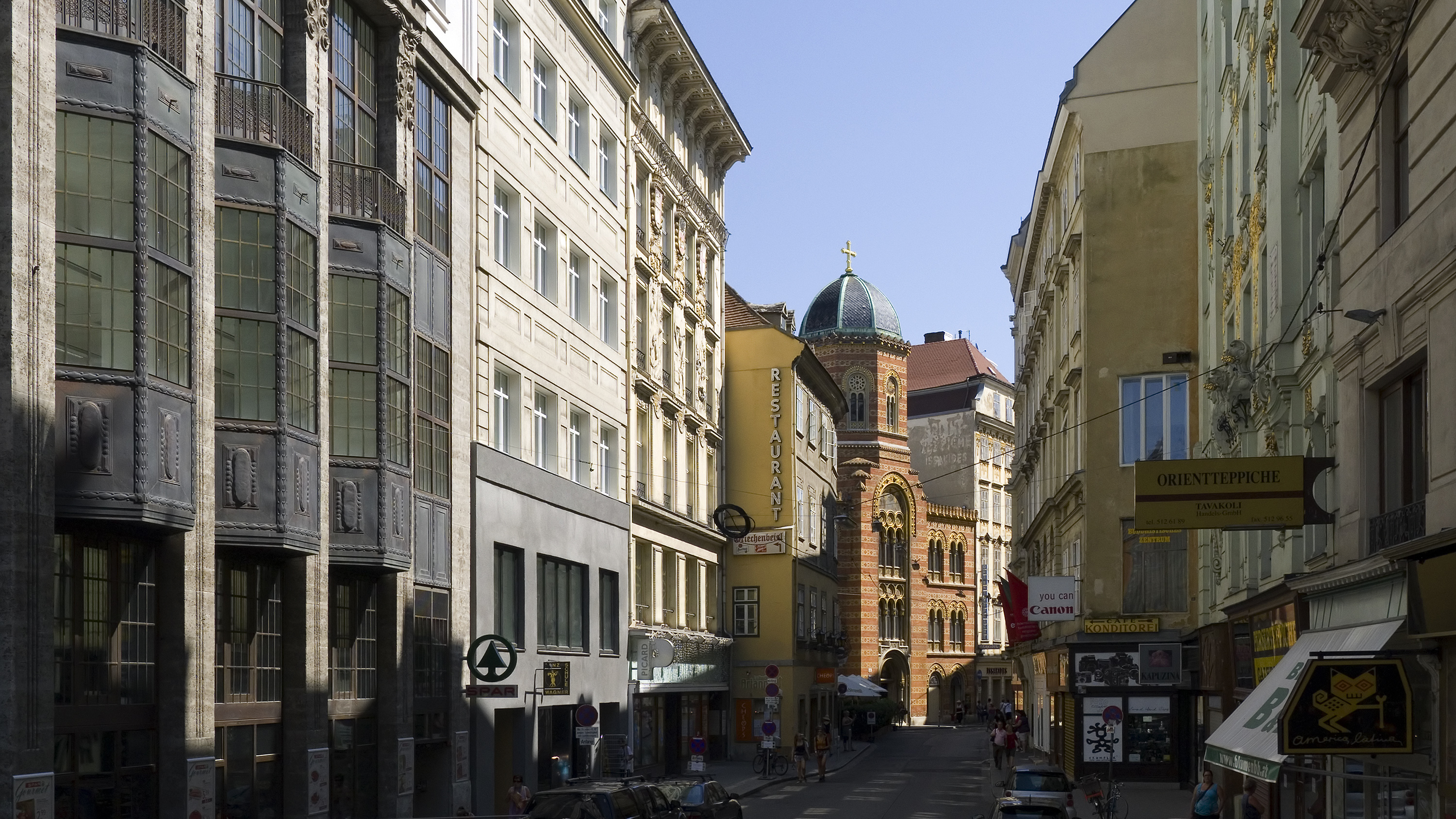 Fleischmarkt in Wien 1 bei Nr. 12 in Richtung Osten